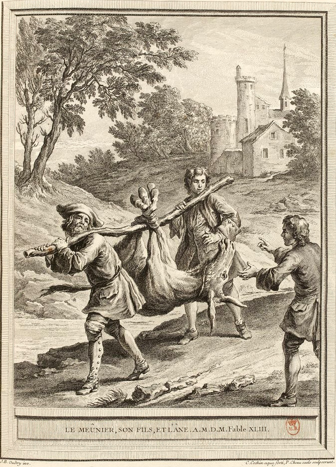 Gravure réalisée par Pierre Chenu et Charles-Nicolas Cochin (II) d'après un dessin de Jean-Baptiste Oudry représentant la fable Le meunier, son fils et l'âne de Jean de La Fontaine (fable 1 du livre III). Cette gravure est parue dans l'édition complète des fables de La Fontaine, parue en quatre tomes chez l'éditeur Desaint & Saillant, rue saint Jean de Beauvais à Paris, 1755-1759.